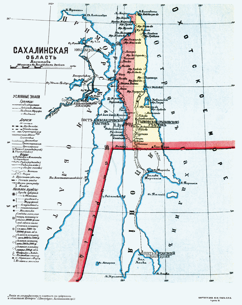 Карта Сахалинской области, 1913